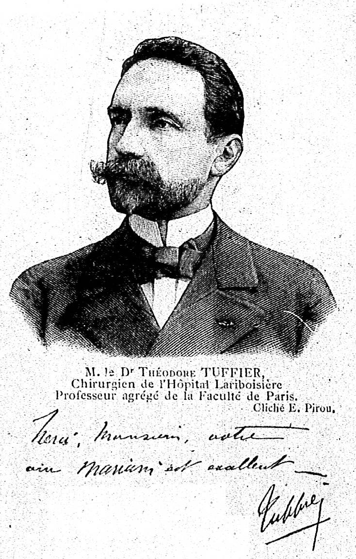 image du fond de la bibliothèque de reims.